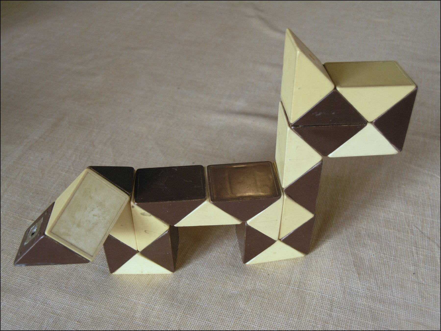 Rubik's Snake